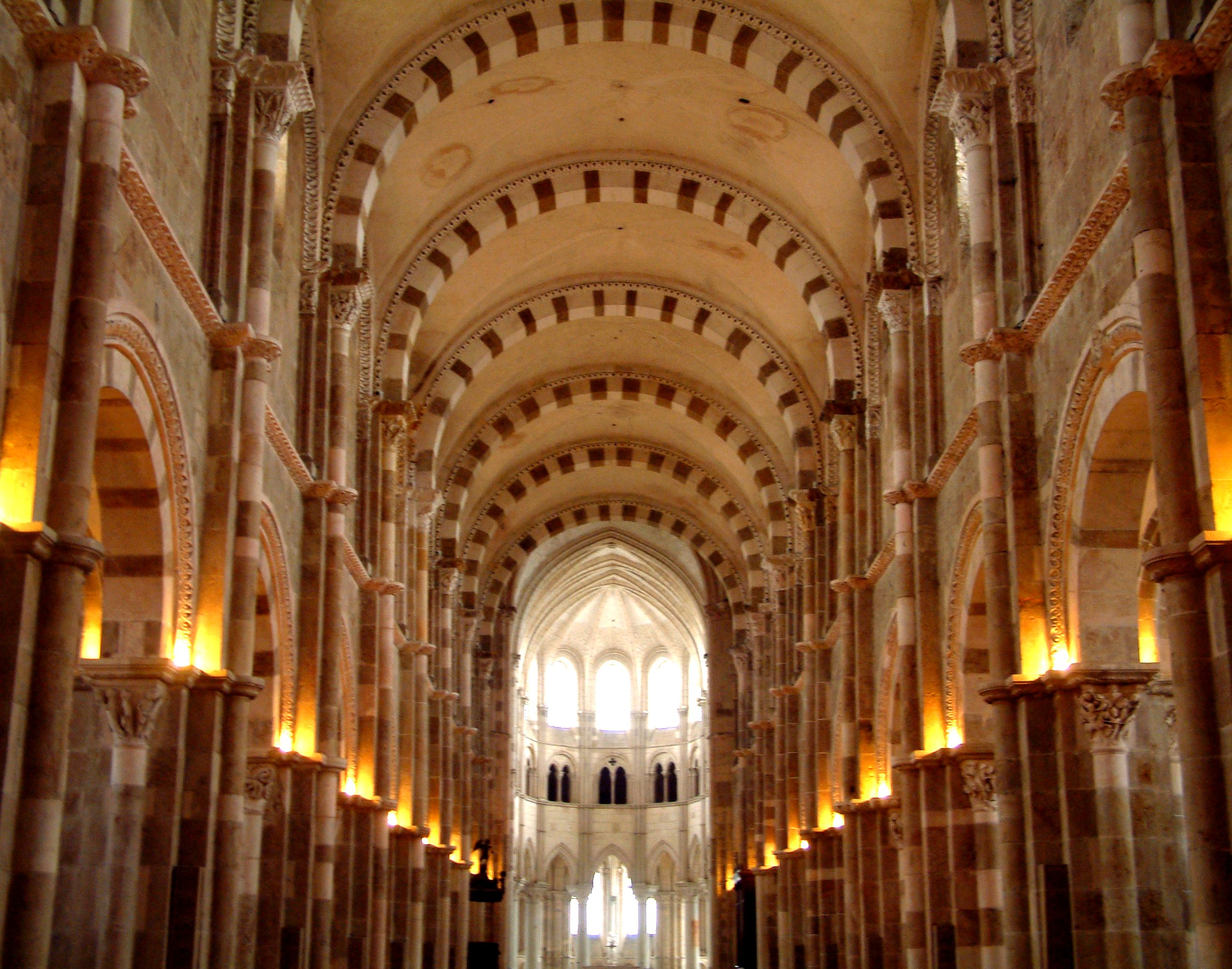 Vezélay - Nau interior